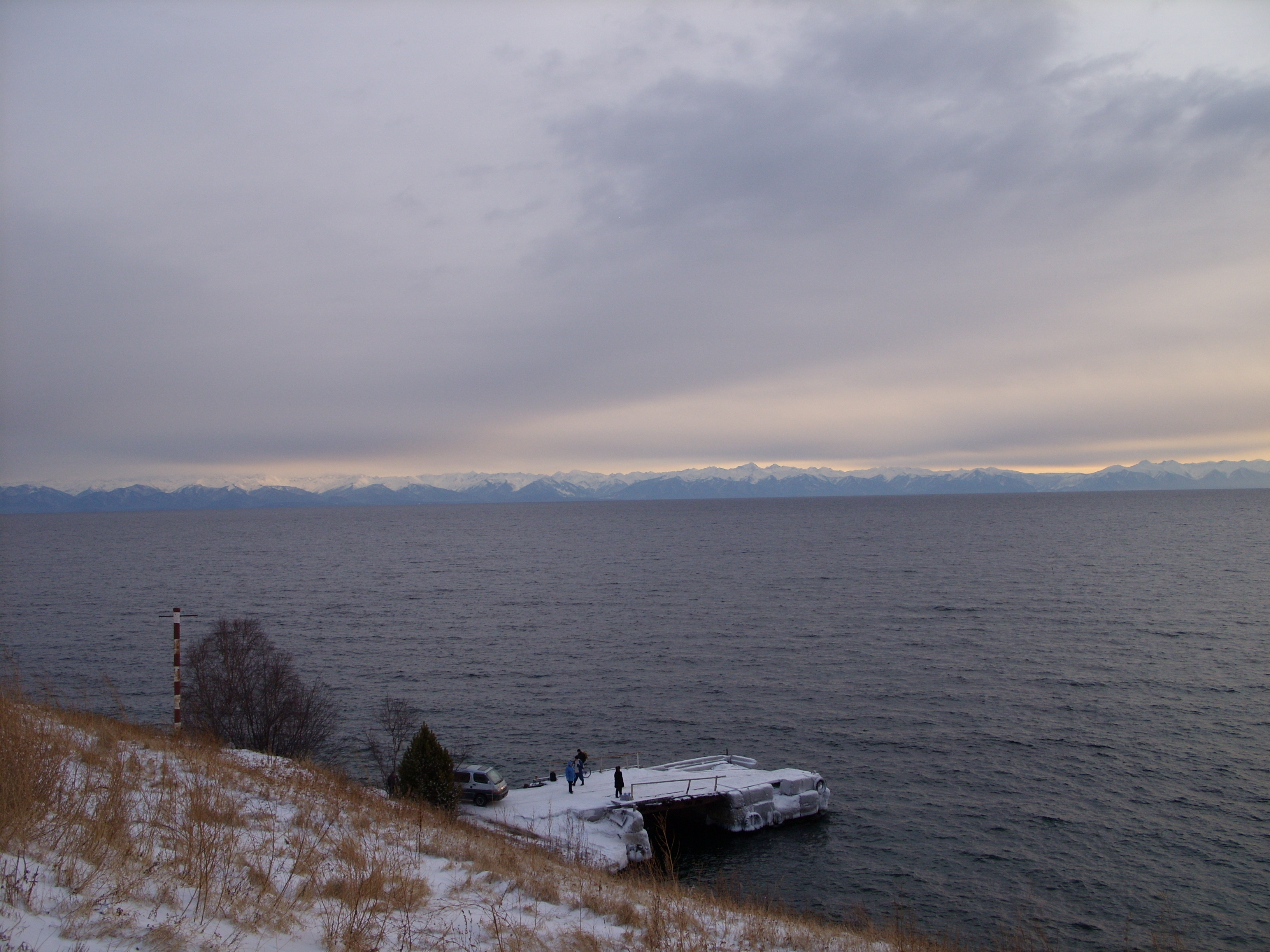 Видны сходни парома Листвянка - Порт Байкал